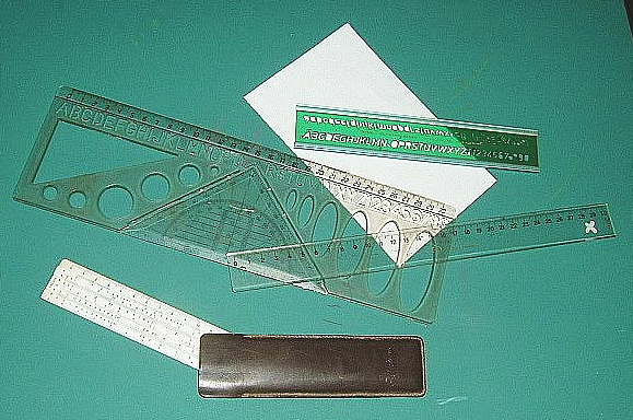 Source: Peng 15:12, 15 May 2005 (UTC) selbst fotografiert,am 24.9.04 gnu-fdl, Bild:verschiedene Lineale + Rechenschieber Lizenz